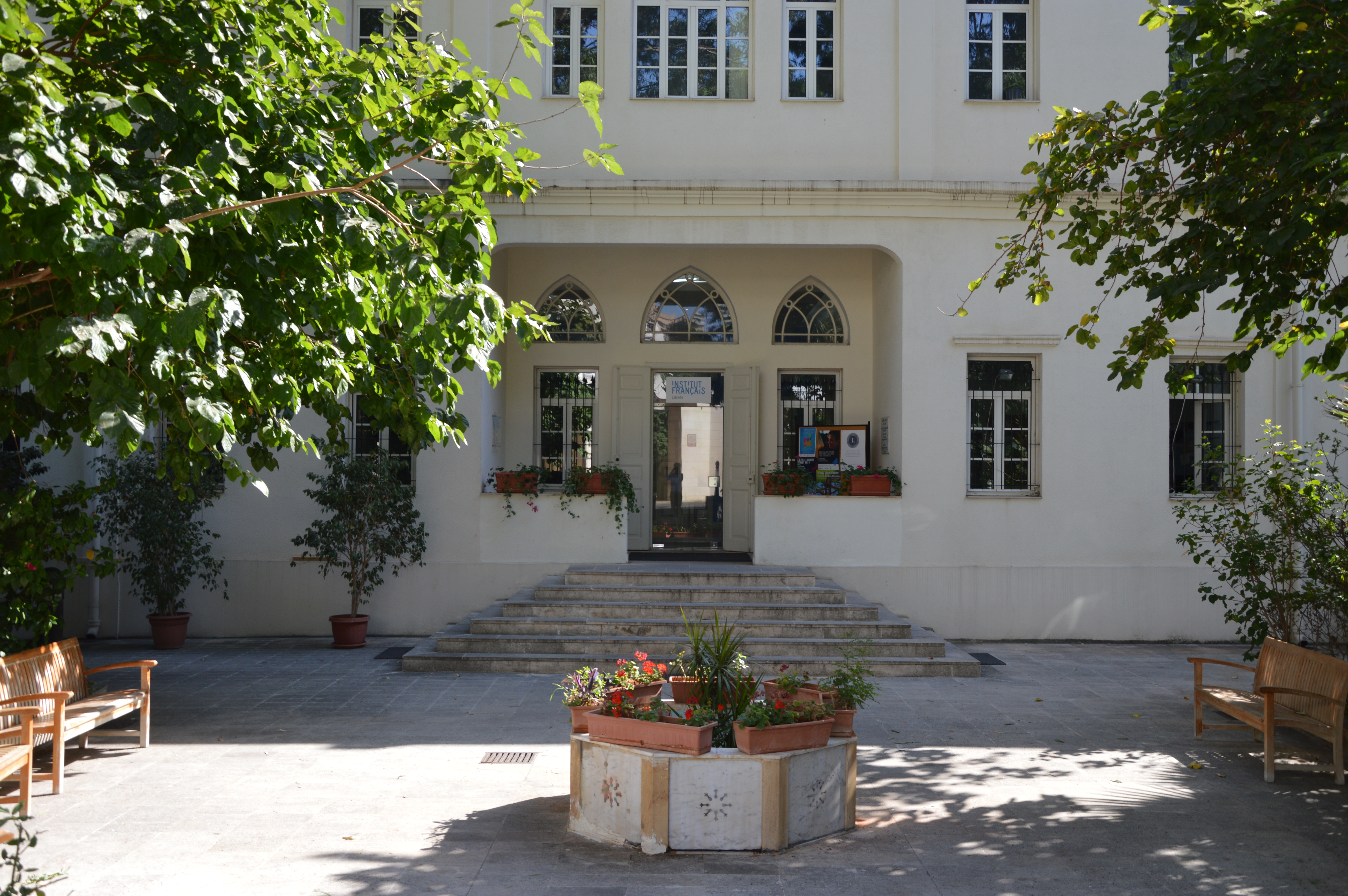 Situé au cœur de l'Espace des Lettres, rue de Damas à Beyrouth, l'Institut français dispose d'une entrée élégante et arborée.